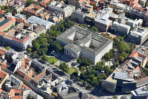 Pollack Mihály fő műve a Magyar Nemzeti Múzeum épülete légifotón